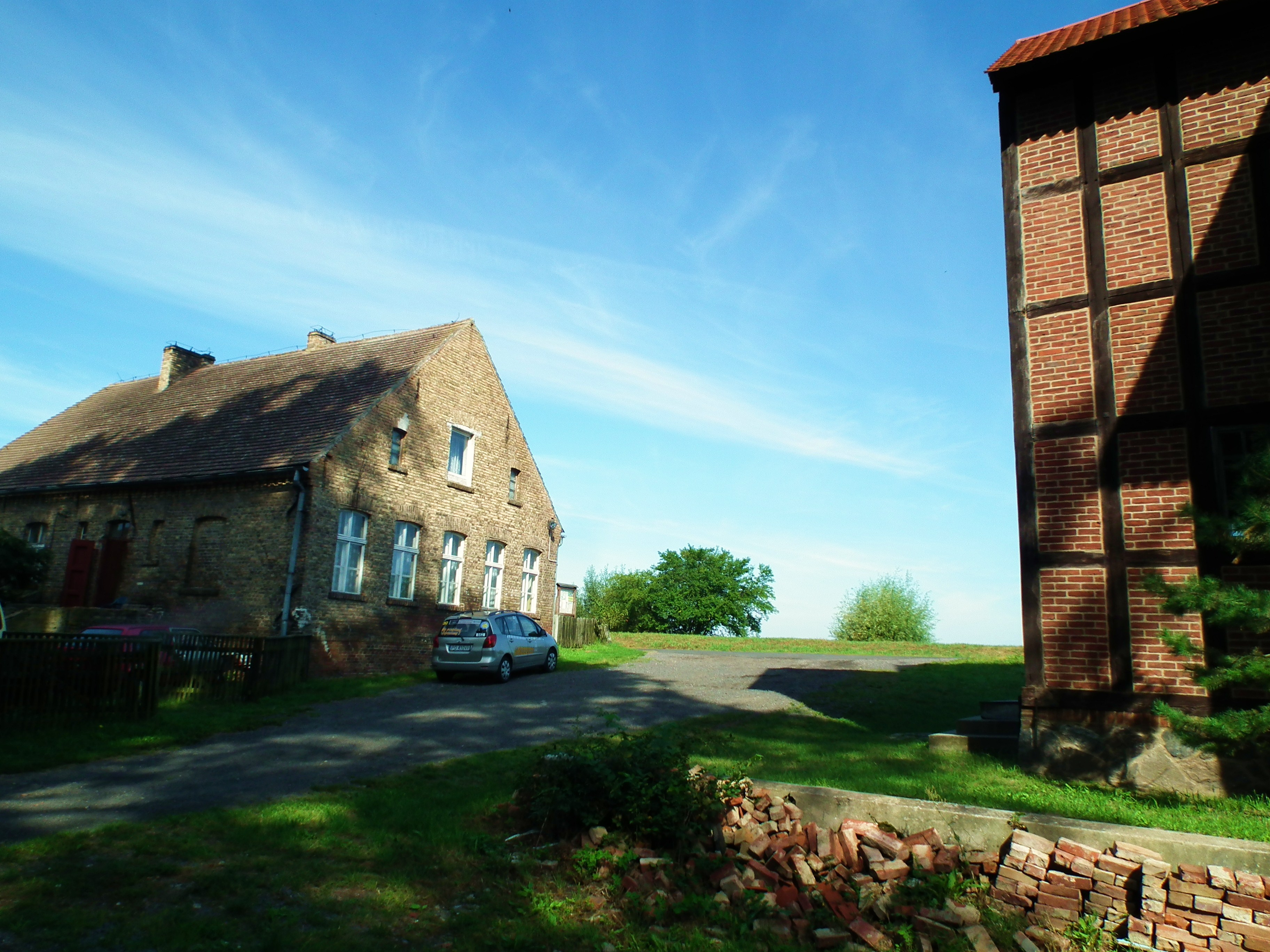 Oksza - fragment wsi w rejonie kościoła, nad wałem warciańskim.